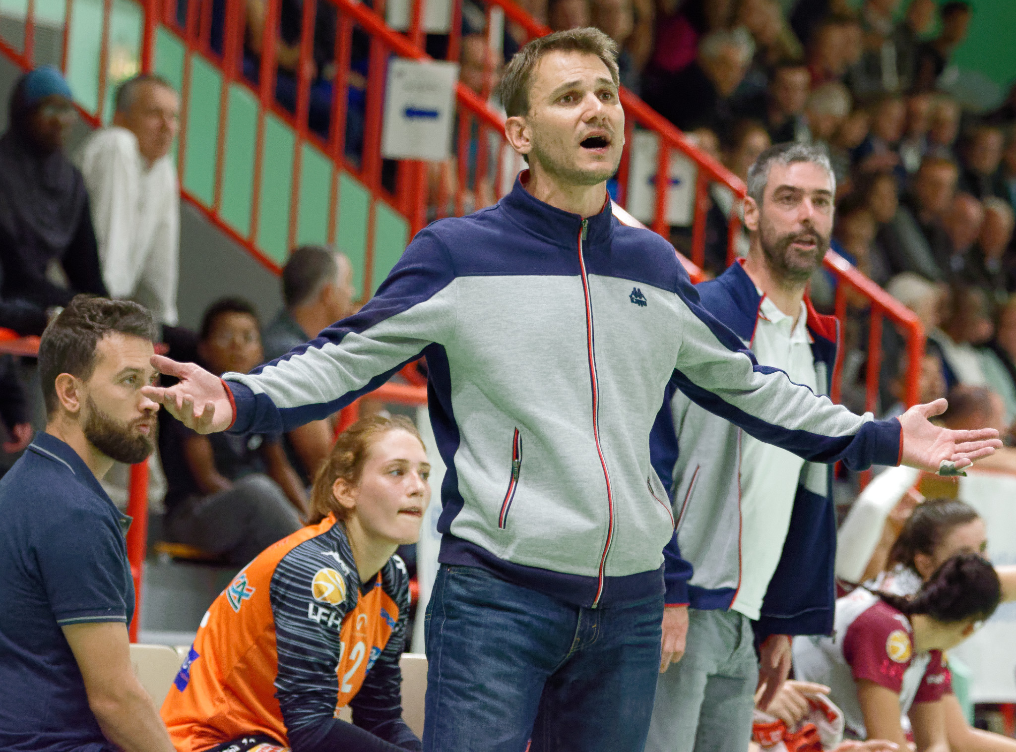 Rencontre de LFH entre Paris92 et Chambray. A Meudon la forêt, le 10 octobre 2018.